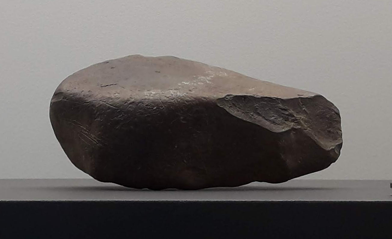 Mapa d'Abauntz, al museu de Navarra. És un mapa prehistòric gravat en una pedra.[1] Abauntzako mapa, Nafarroako museoan. Map of Abauntz, a prehistorical map engraved in a rock.[2]